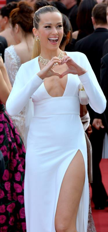 Petra Němcová au festival de Cannes